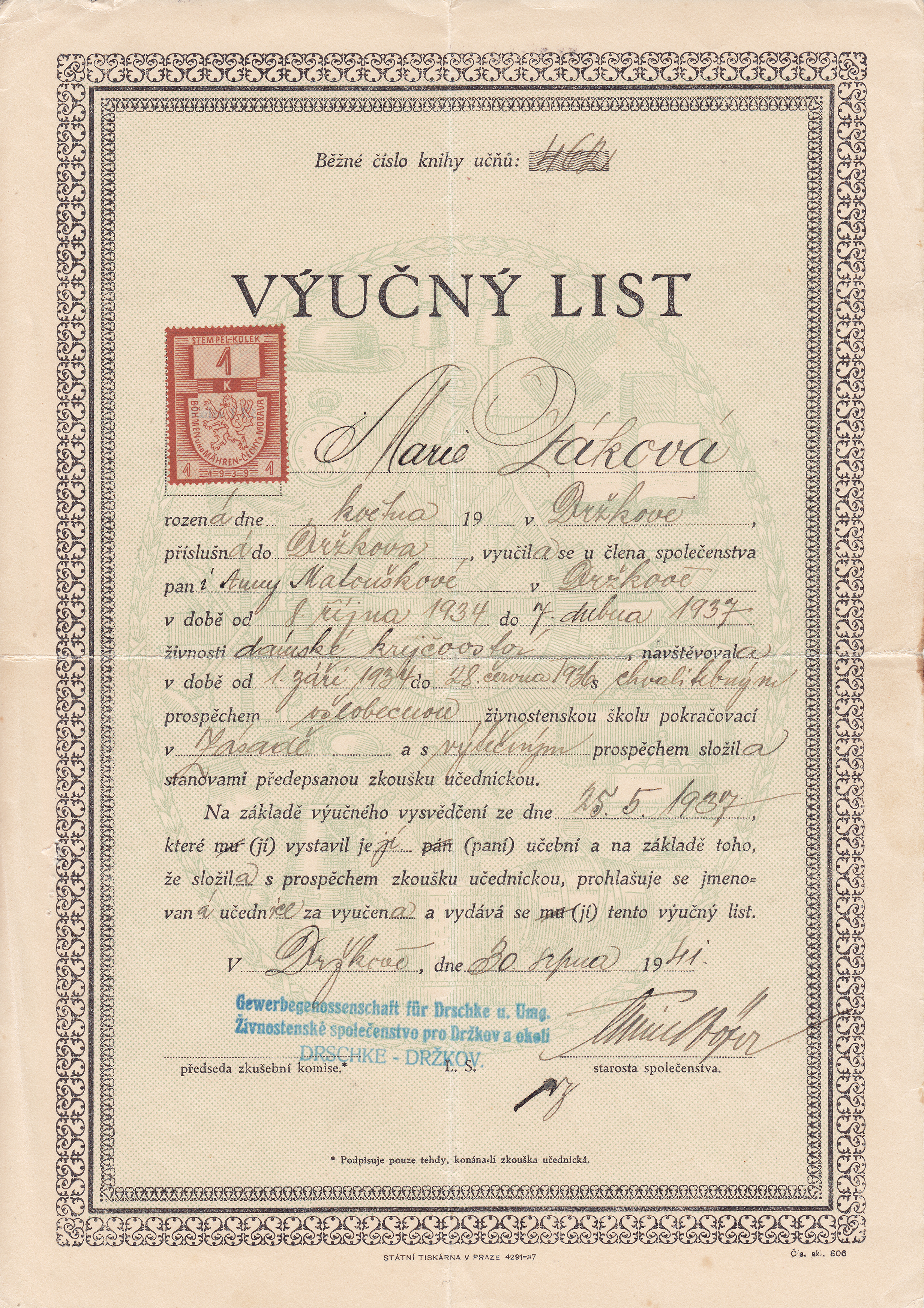 Sken originálního výučního listu.